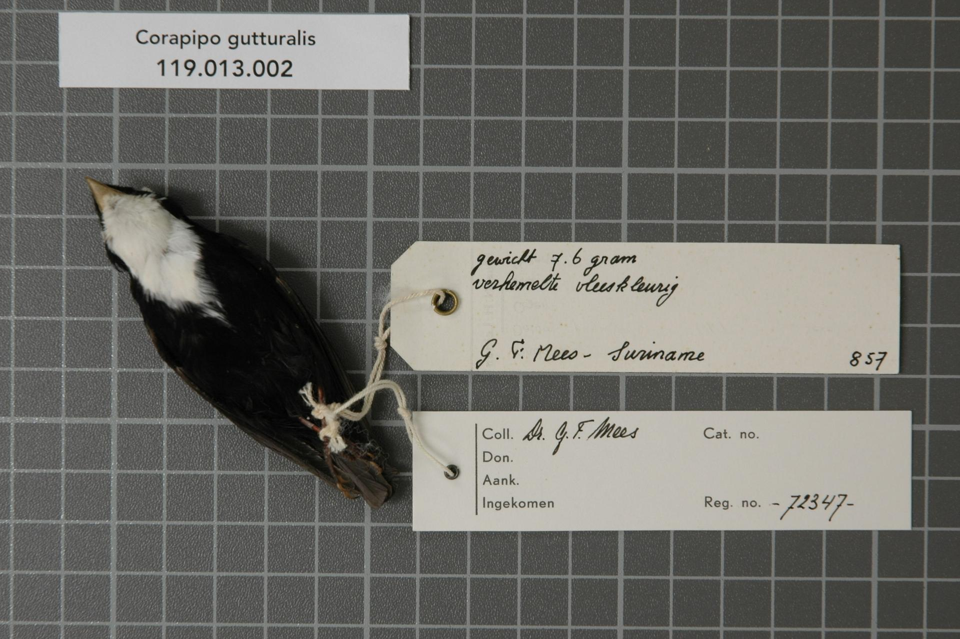 Corapipo gutturalis (Linnaeus, 1766)